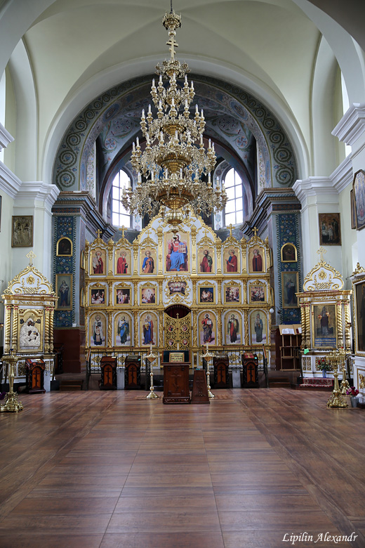 Пінская Свята-Варварынская царква. Іканастас